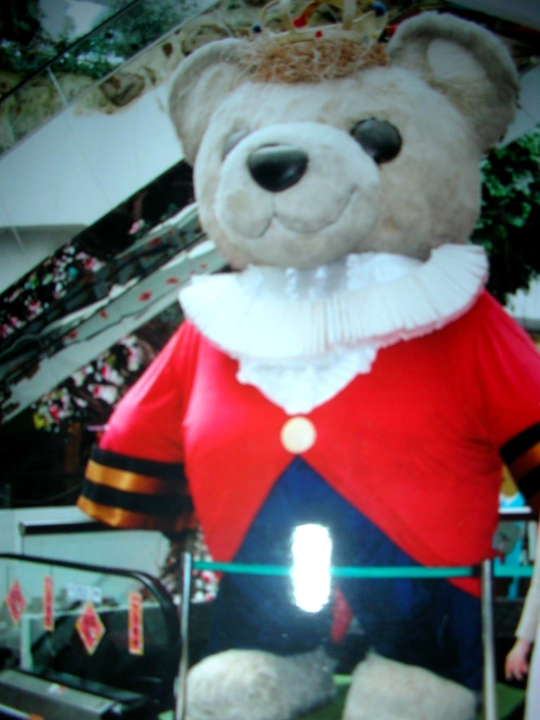 Teddy Bear Kingdom, Hong Kong 香港小熊國巨型泰迪熊像